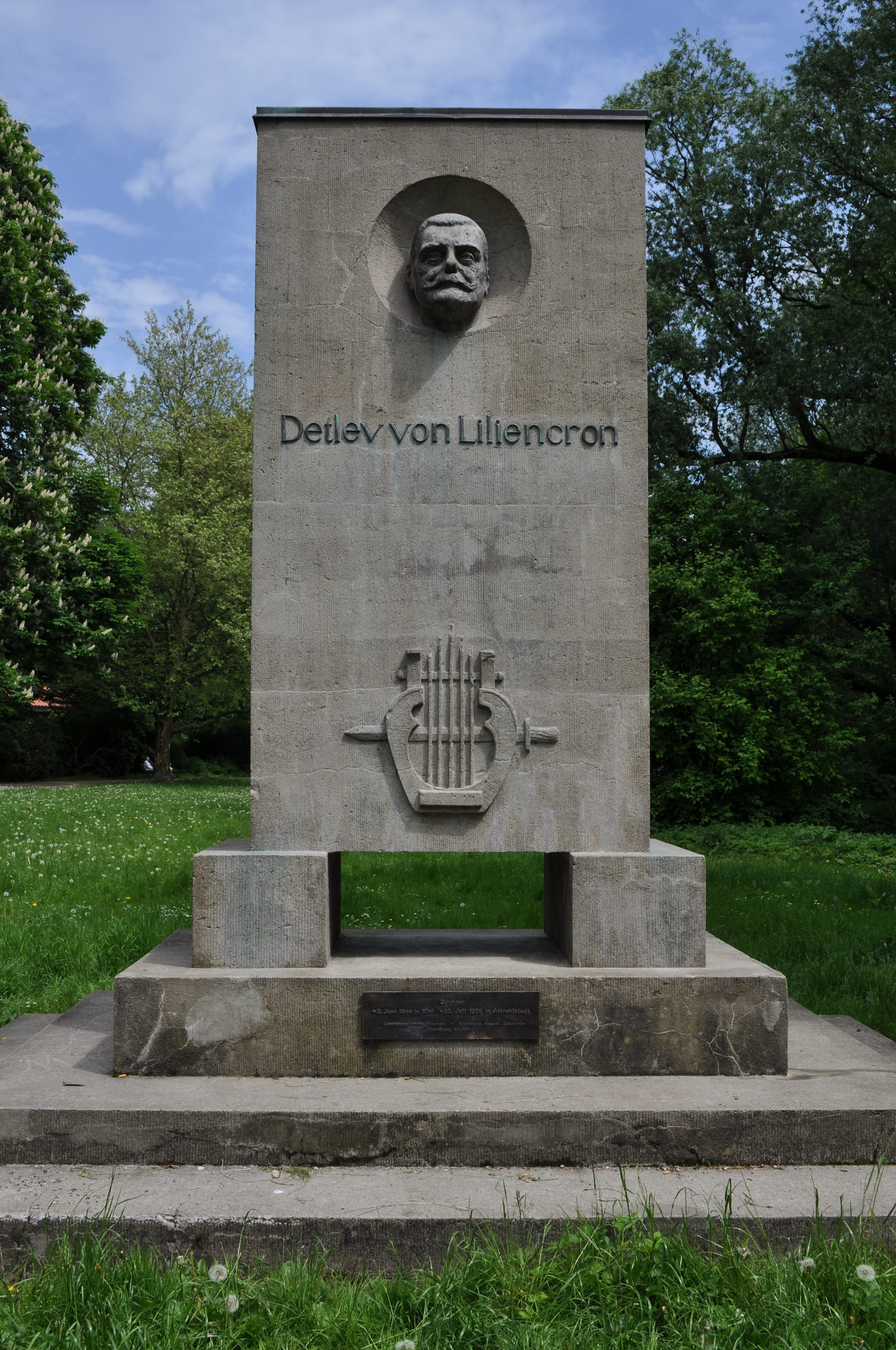 Liliencrondenkmal im Liliencronpark in Hamburg-Rahlstedt.